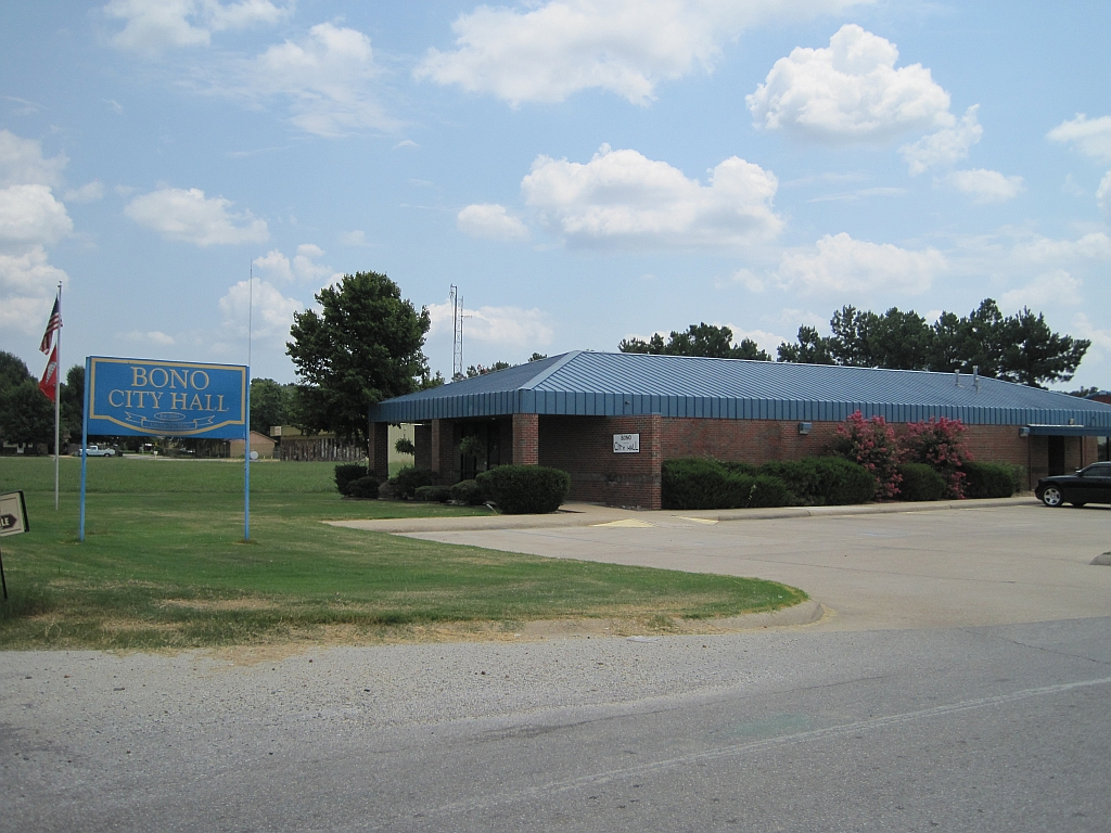 Bono, Arkansas